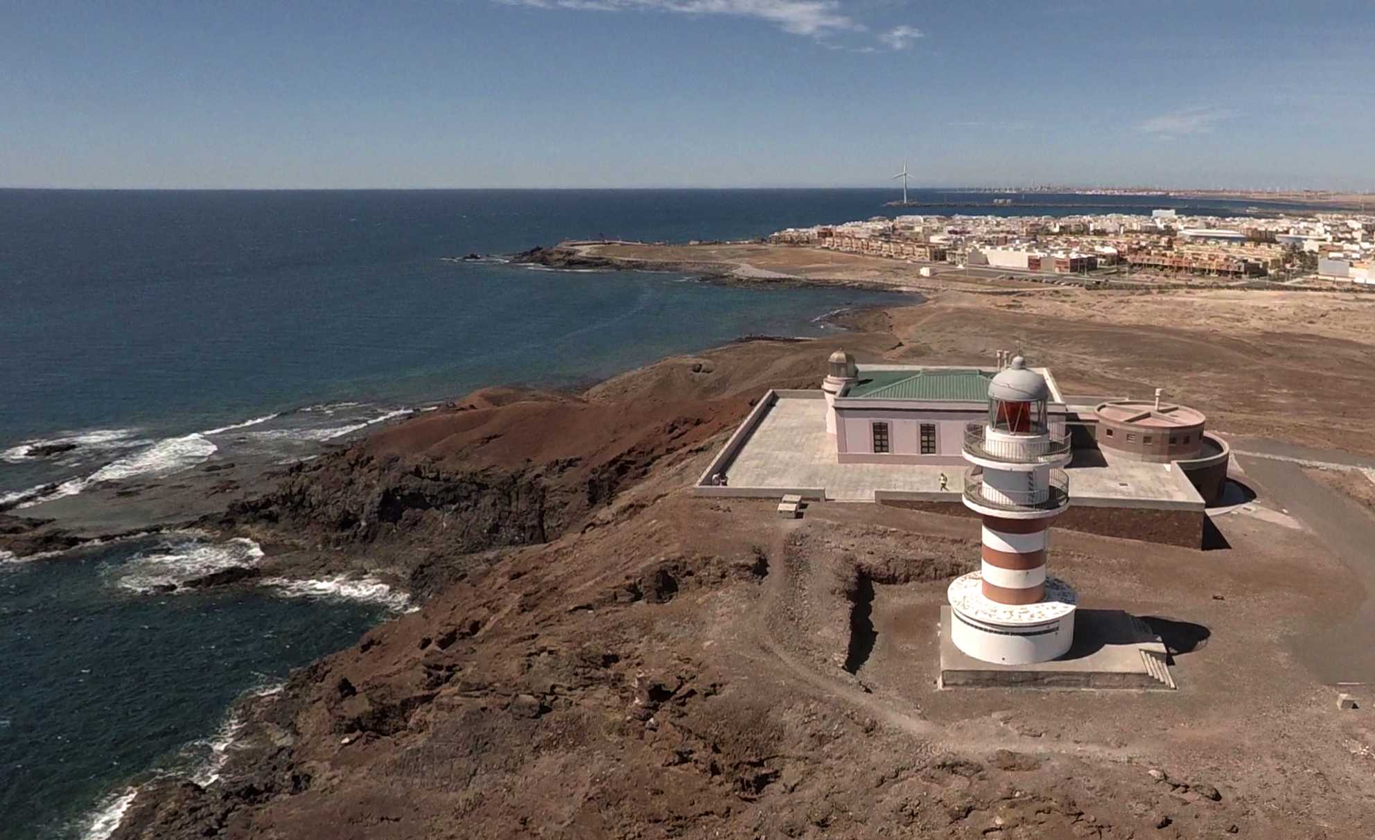 Arinaga This is a photography of a Site of Community Importance in Spain with the ID: ES7010049. Natura2000 entry, EEA entry